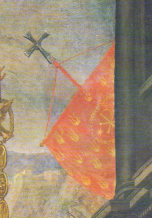 Apparizione della croce a Costantino (Grazio Cossali, Duomo vecchio, Brescia) dettaglio